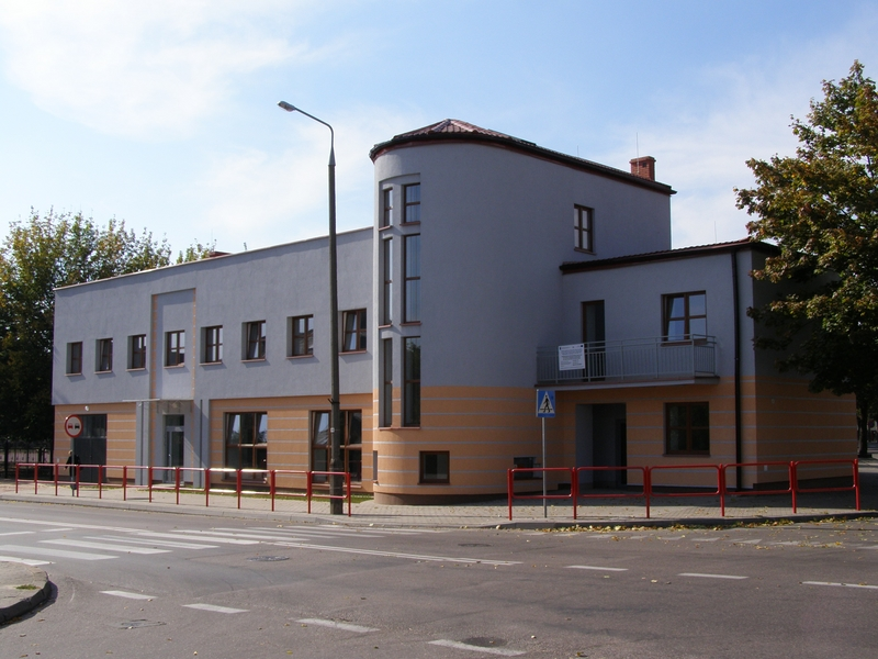 Grajewo - Grajewska Izba Historyczna przy ul. Ełckiej